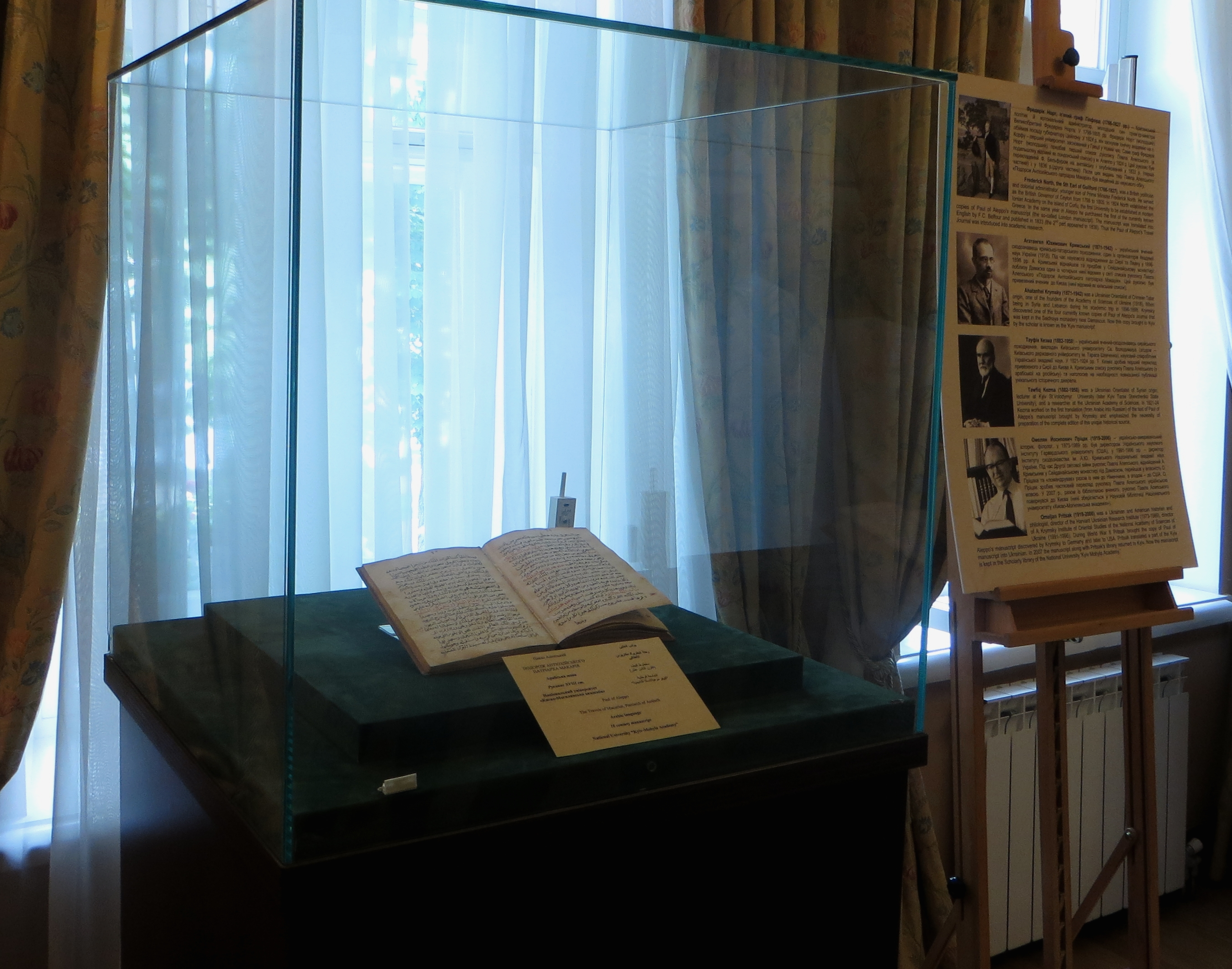 «Подорож патріарха Макарія» Павла Алеппського з колекціїбібліотеки НаУКМА на виставці у Софії Київській